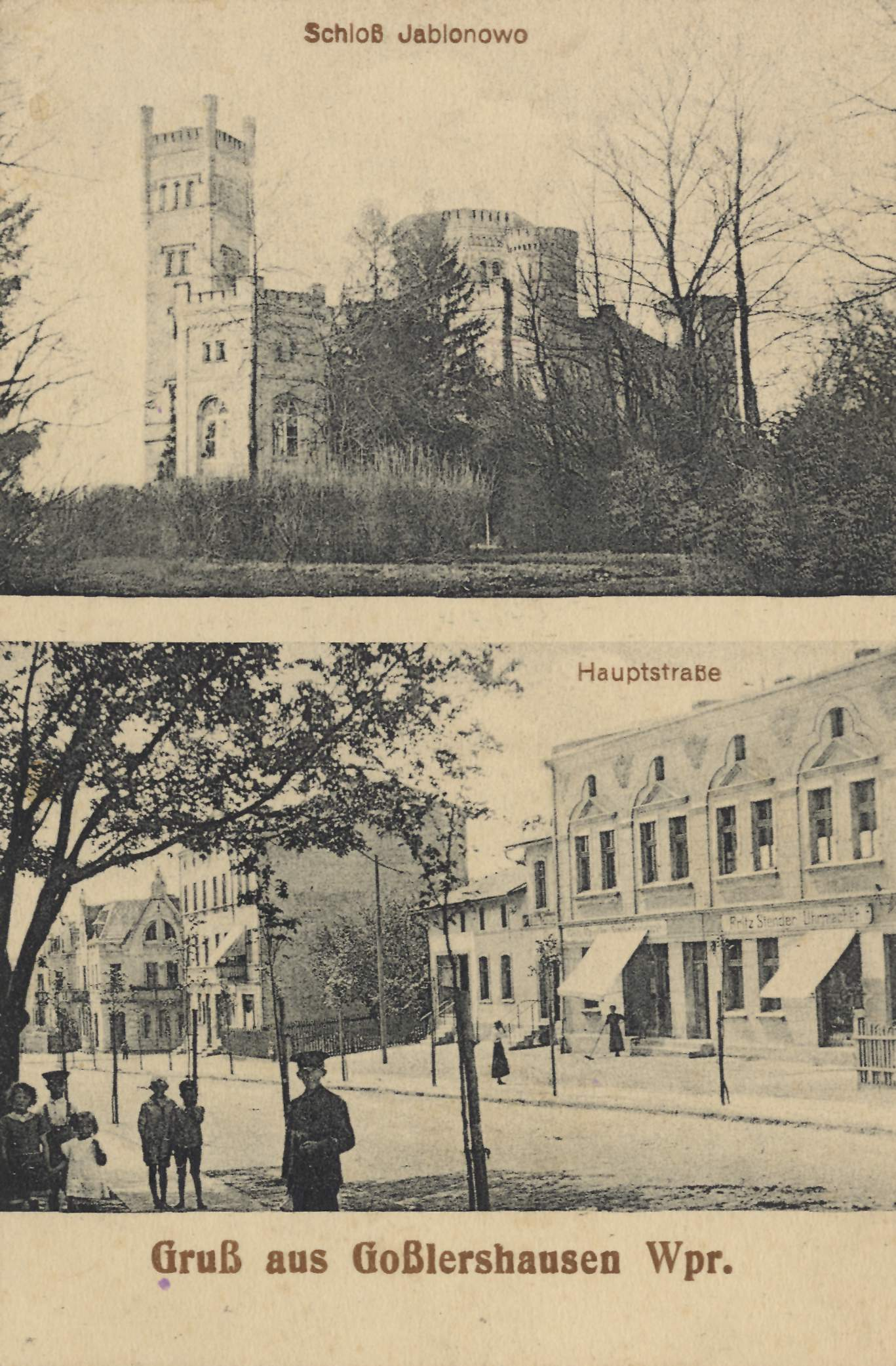 Schloss Jablonowo; Hauptstraße